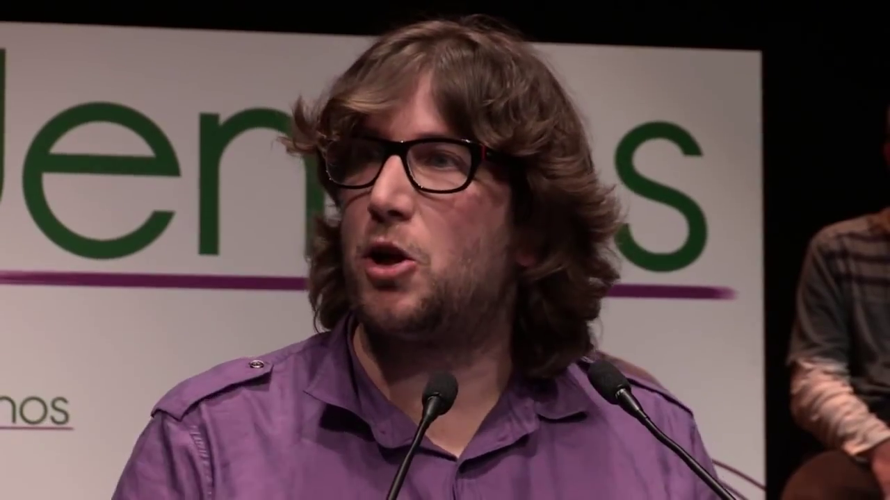 Presentación de Podemos en Madrid (16 de enero de 2014)